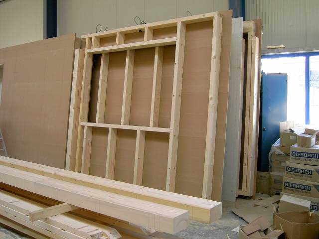 Holzständerwand in einer Zimmerei